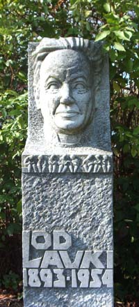 Standbeeld Lod. Lavki in Hasselt. Eigen werk.